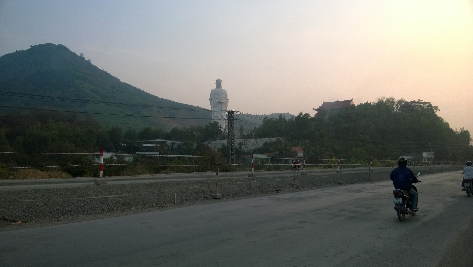 Chùa Tòng Lâm Lô Sơn, Vĩnh Phương, Nha Trang